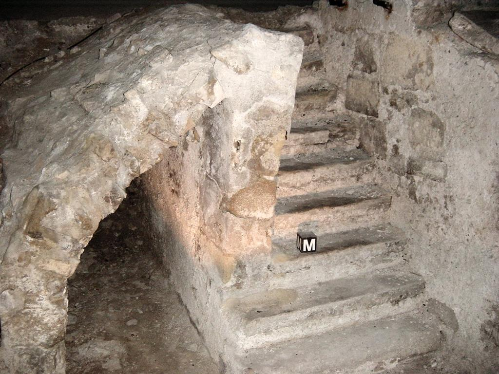 La crype archéologique du Parvis Notre-Dame, Paris, Detailaufnahme